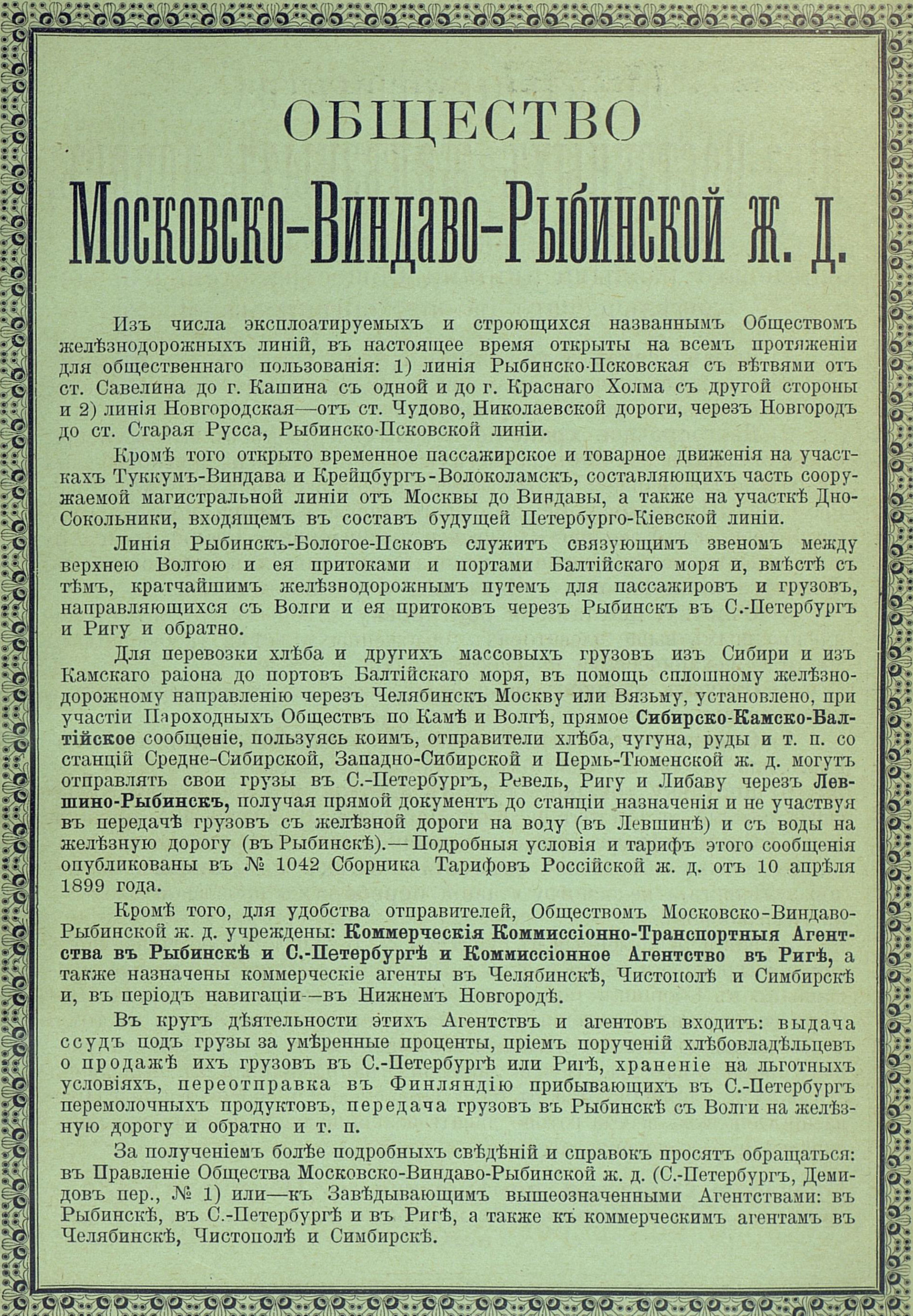 Реклама услуг Московско-Виндаво-Рыбинской жел. дор., 1901 год.